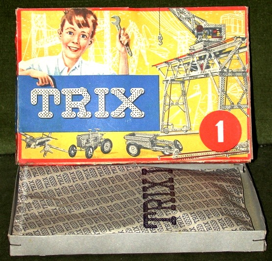 Trix-Metallbaukasten, kleine Packung für den Anfänger